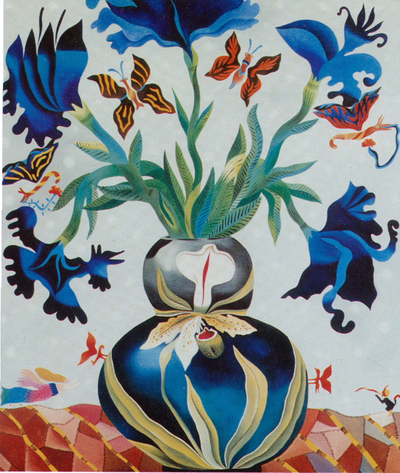 Pequeño demonio, ángel rosado, mariposas negras, flores azules con todo y verde follaje, pretendiendo engalanar con su presencia a tremendo jarrón modernista. 1993 Fotografía de Víctor Ortiz 1995